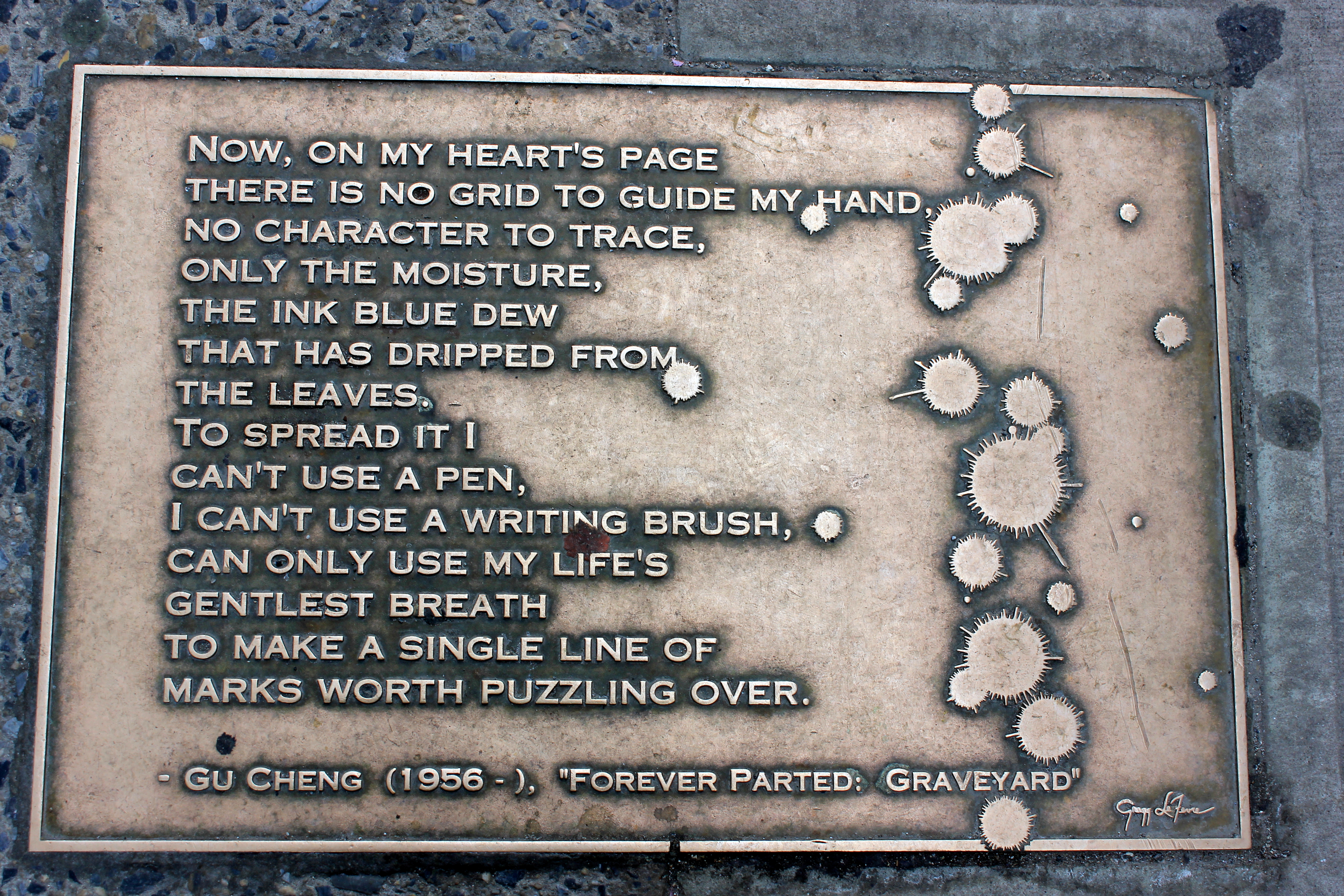 Library Walk New York City